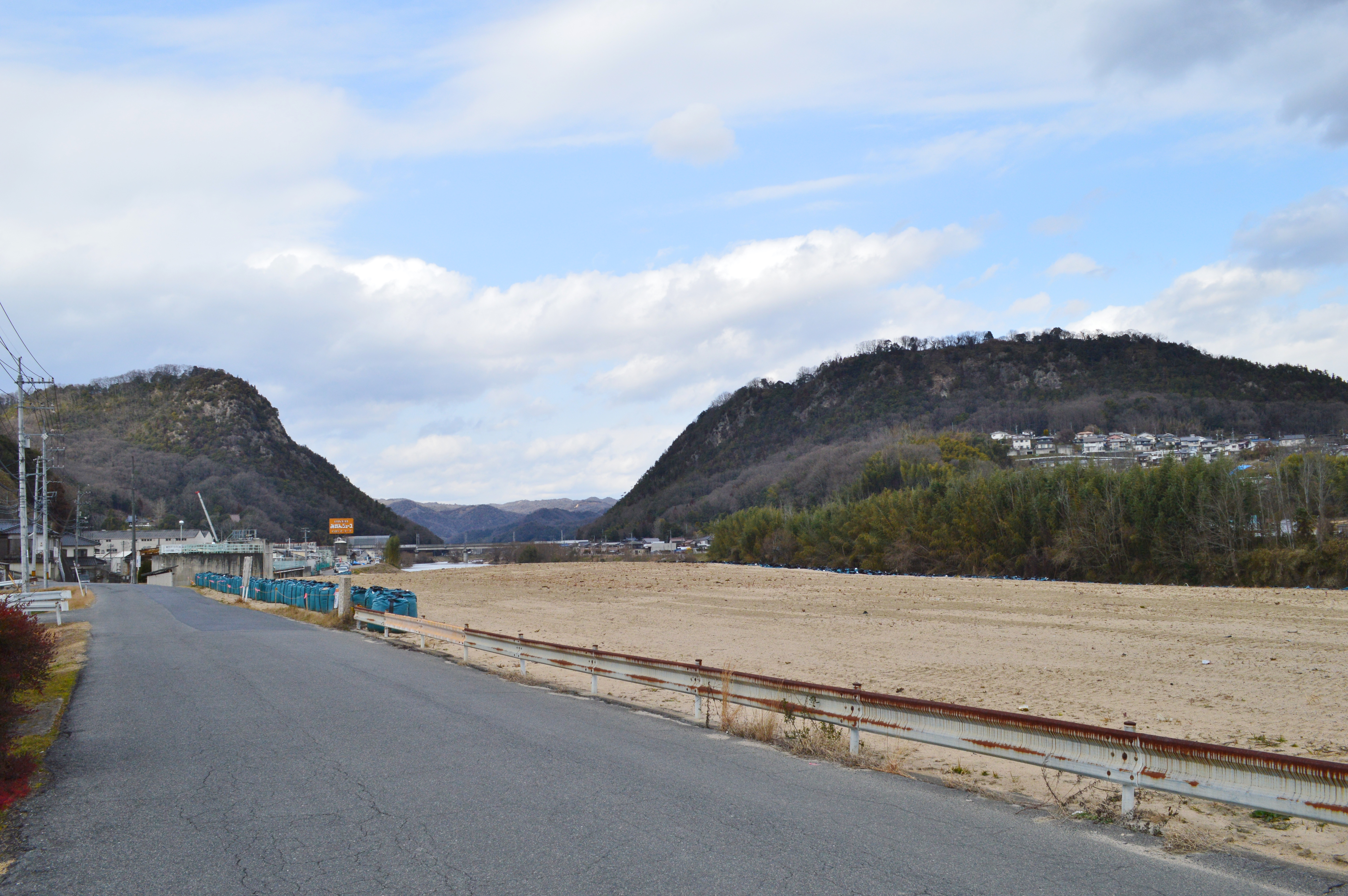 新高山城と高山城 遠景 Nikon D3200